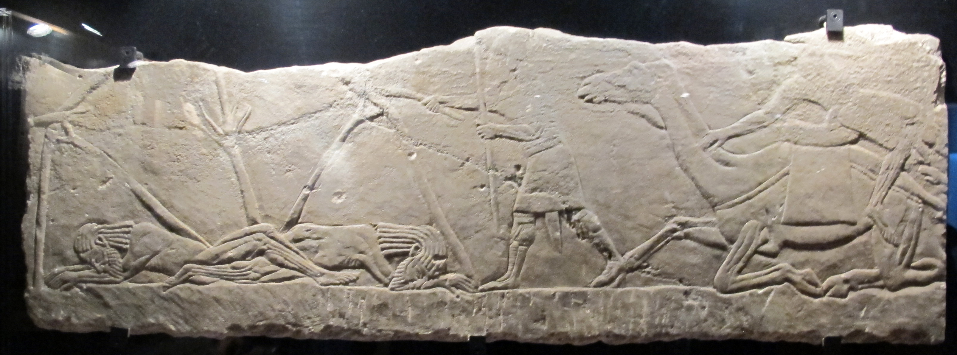 Museo Gregoriano Egizio